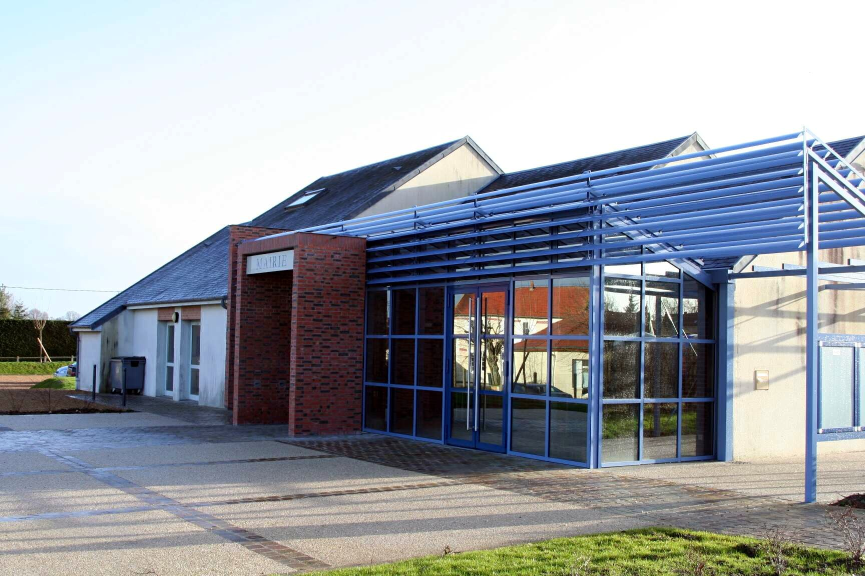 Mairie de Perdreauville - Yvelines (France).